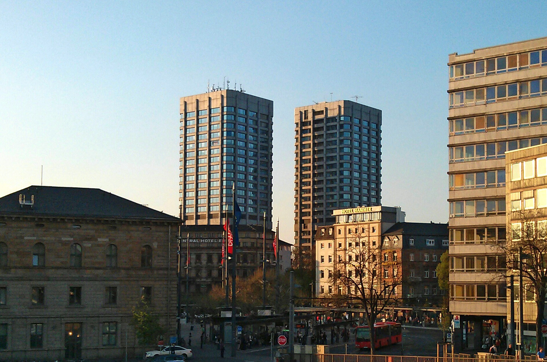 Die beiden Bonifazius-Türme, die höchsten Gebäude der Stadt Mainz.